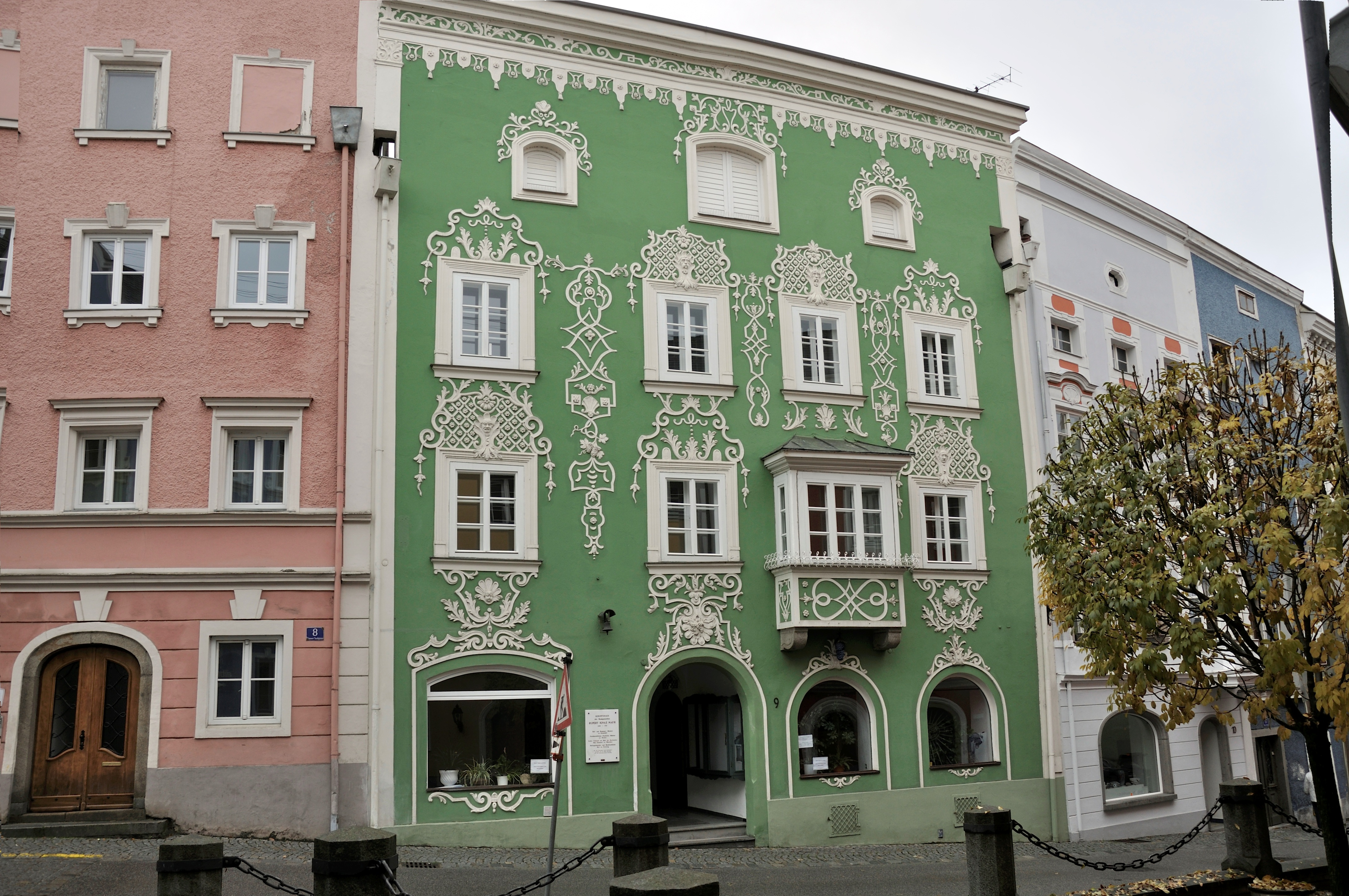 Bürgerhaus, Weinwirtshaus